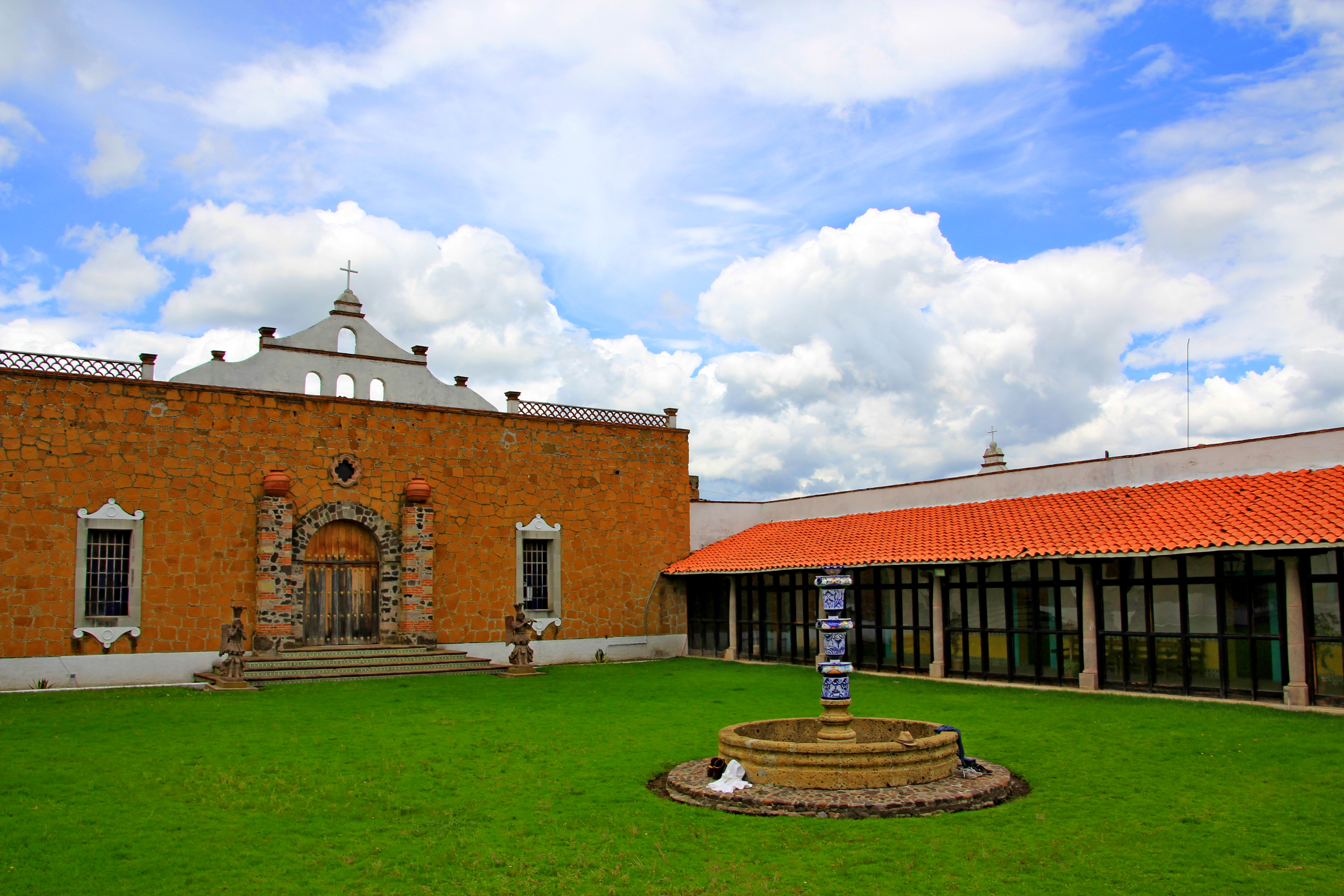 Hacienda ganadera - Tlaxcala